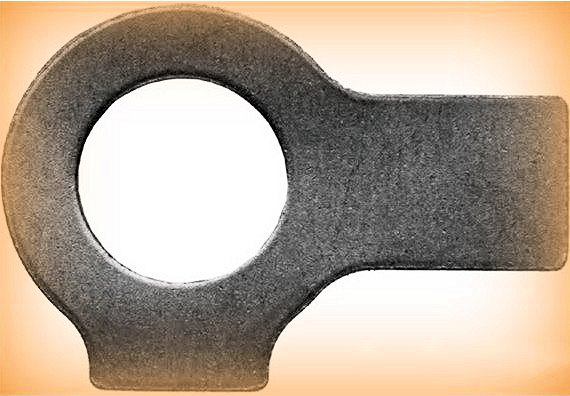 Scheiben mit 2 Lappen DIN 463